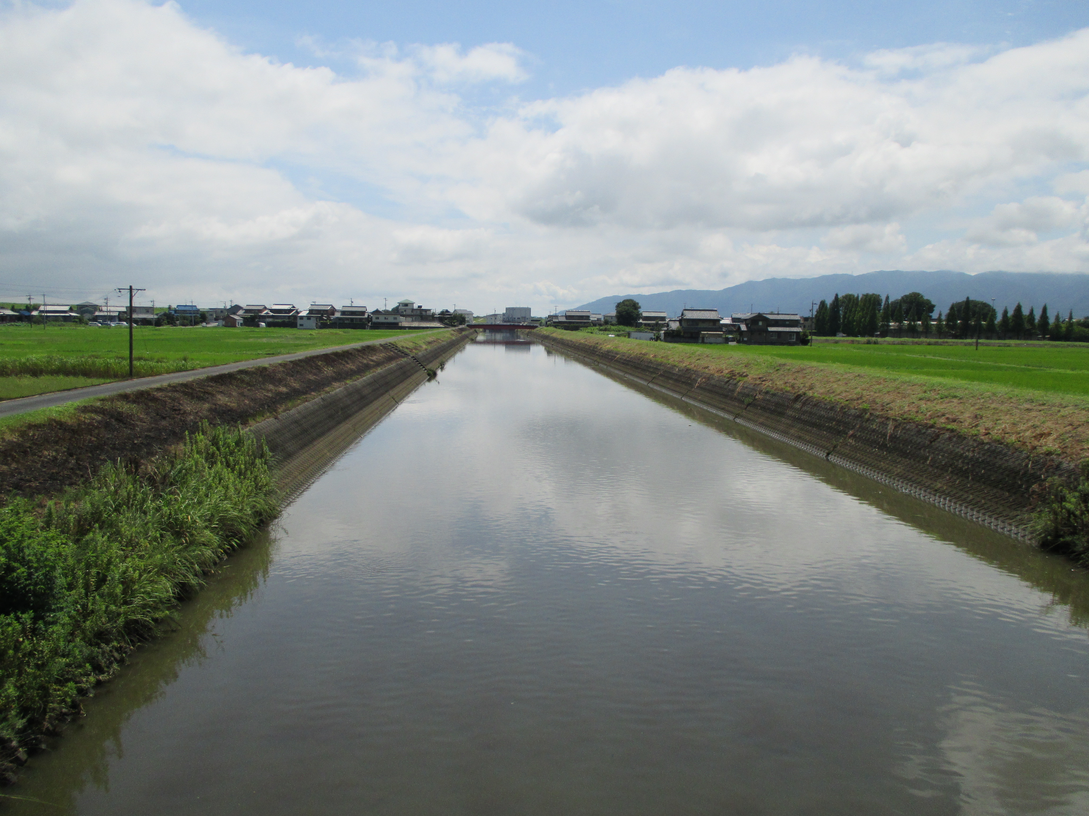 松前橋より北側を撮影